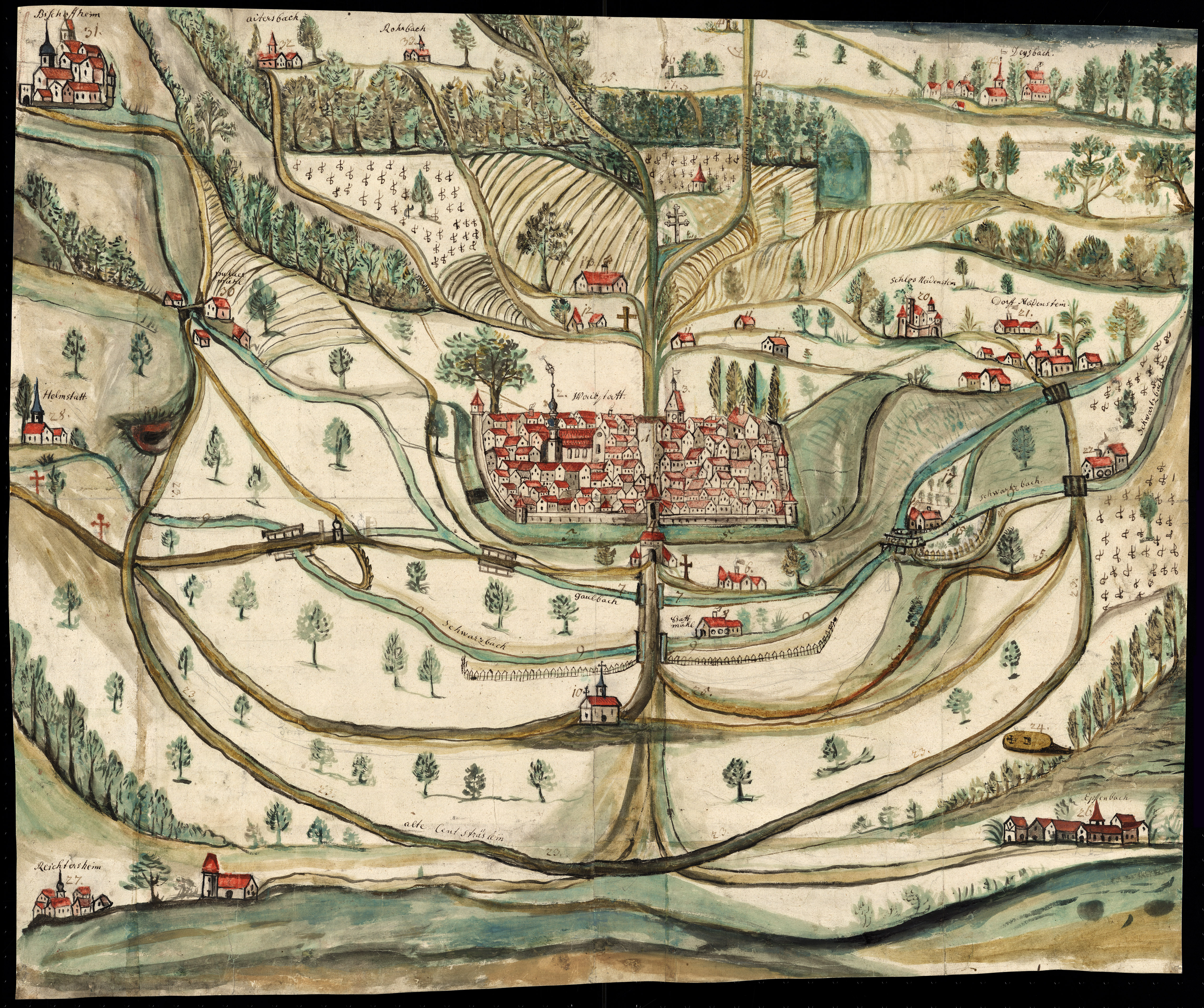 Waibstadt mit Umgebung, 1727 (GLAK H Waibstadt 1)